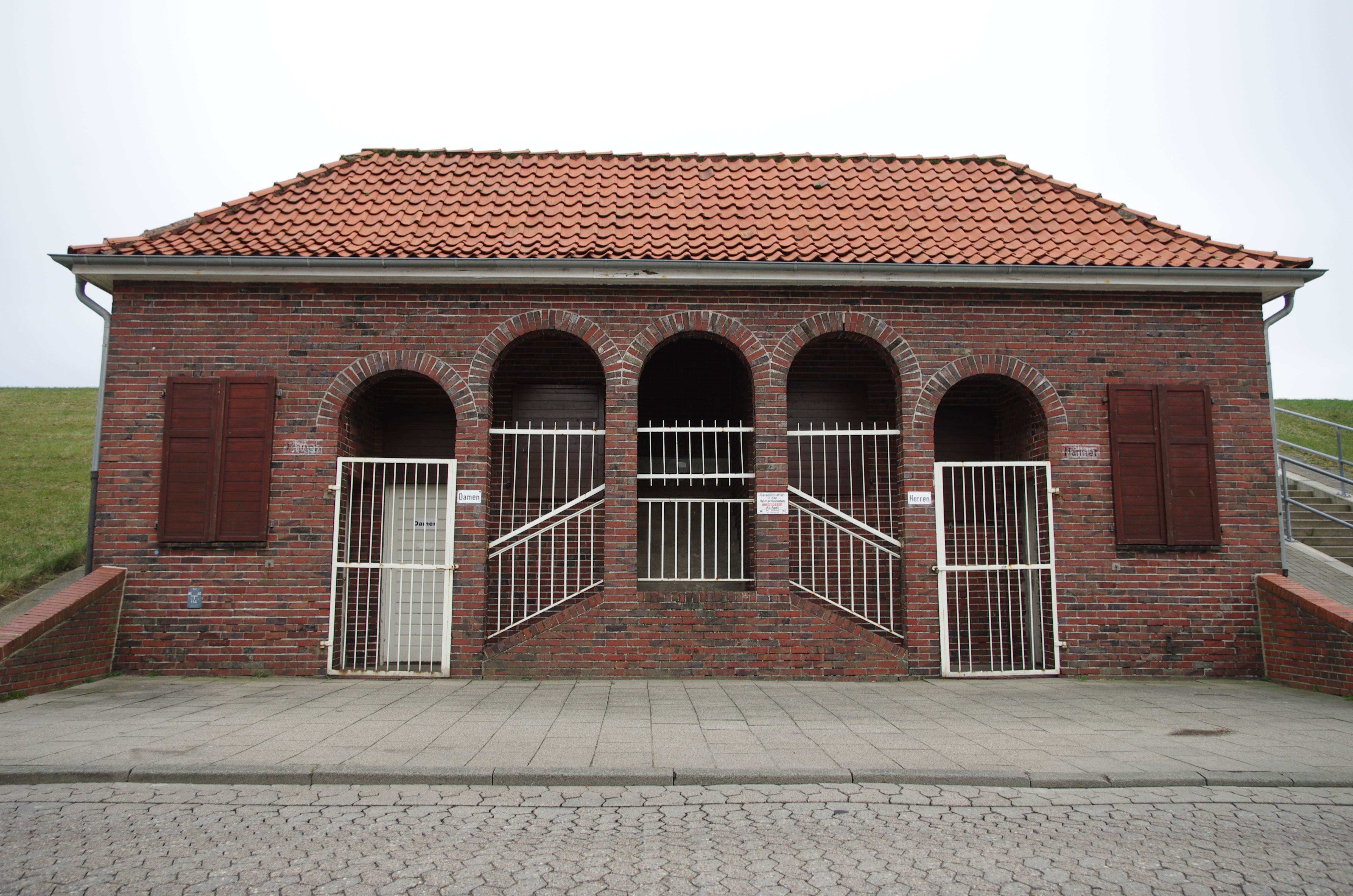 Cuxhaven in Niedersachsen. Die Bürfnisanstalt befindet sich am Seedeich, sie ist Denkmalgeschützt.